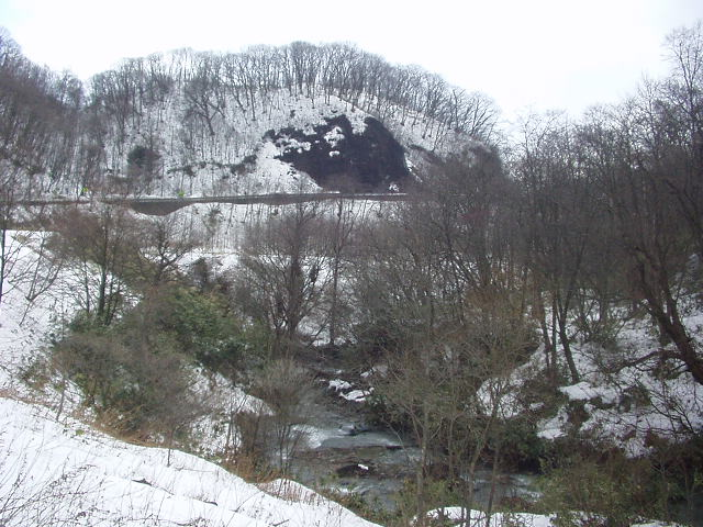 Kusurisanbetsu River. Noboribetsu, Hokkaidō prefecture, Japan.